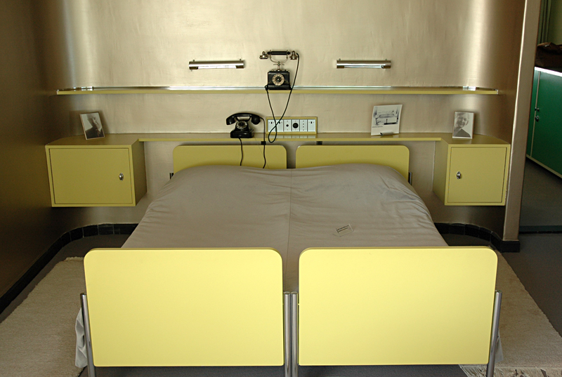 Titel: Bed Gispen 756 Jaar: 1933 Ontwerper: W.H. Gispen Omschrijving: Ledikant met hoofd- en voeteneinde van gefineerd houten borden op verchroomd stalen slede. Collectie: NAi Objectnummer: 5207 Bed 756, W.H. Gispen (1933)